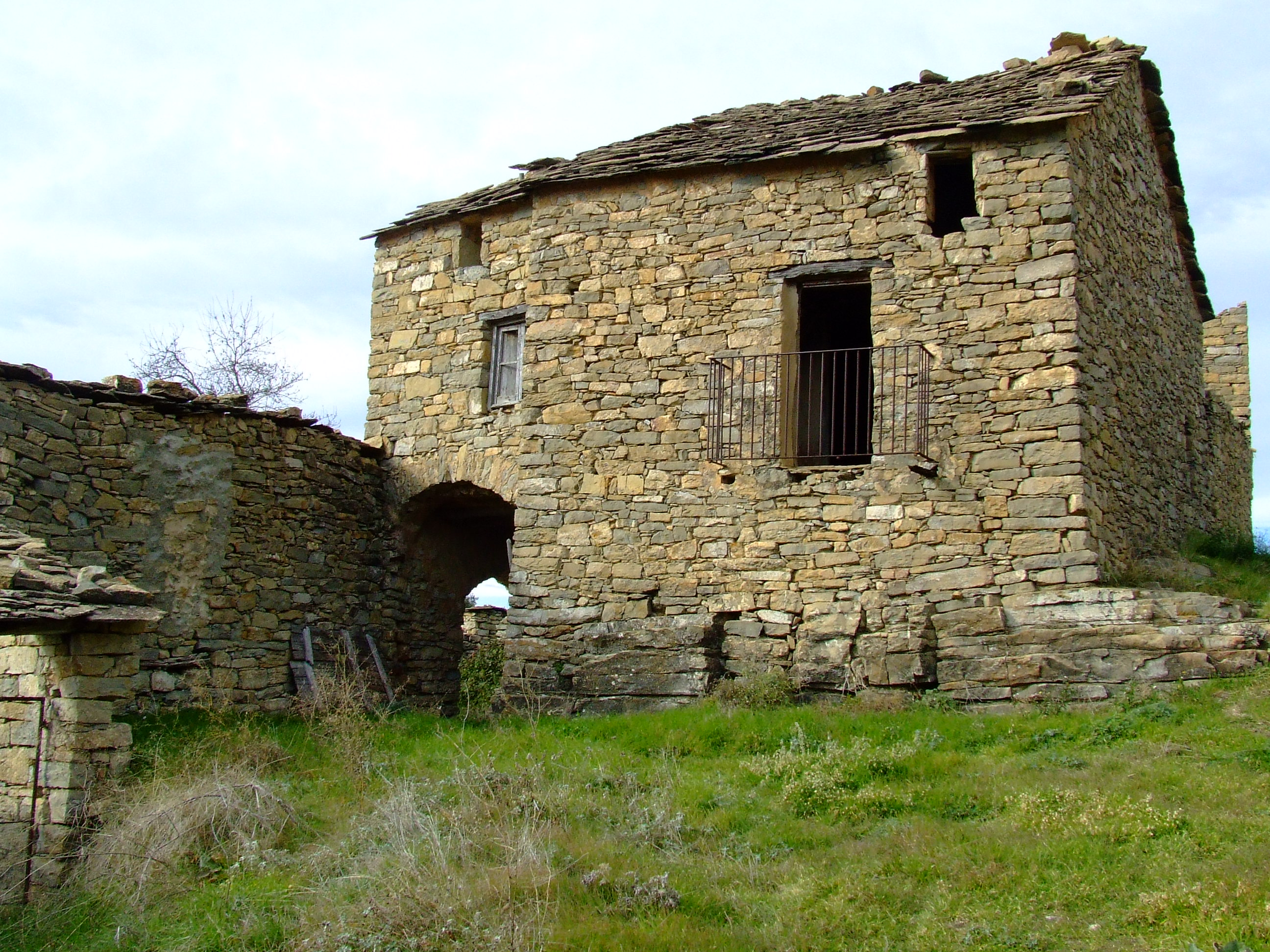 Casa del poble de Siall, amb portal d'entrada (Isona, Isona i Conca Dellà, Pallars Jussà)